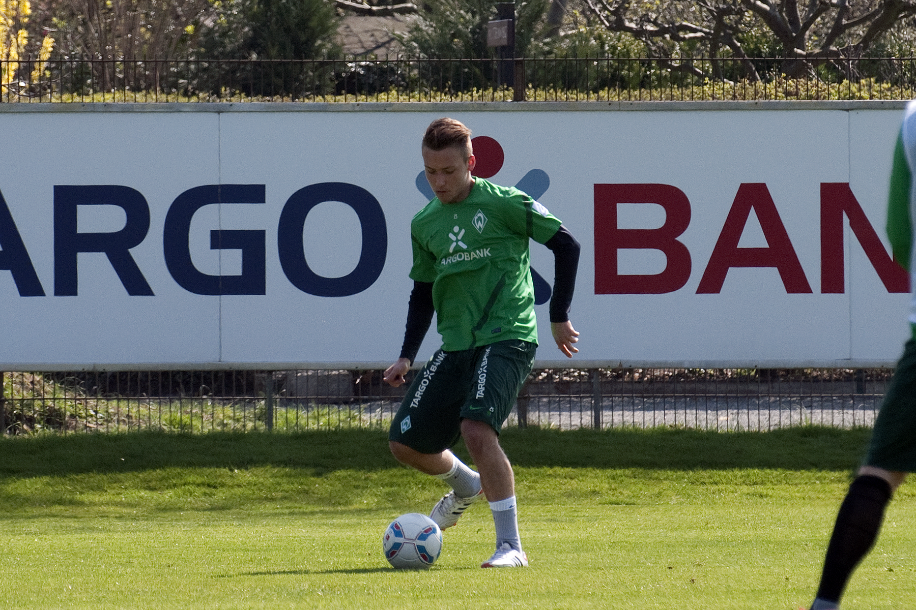 Training 06.04.2012